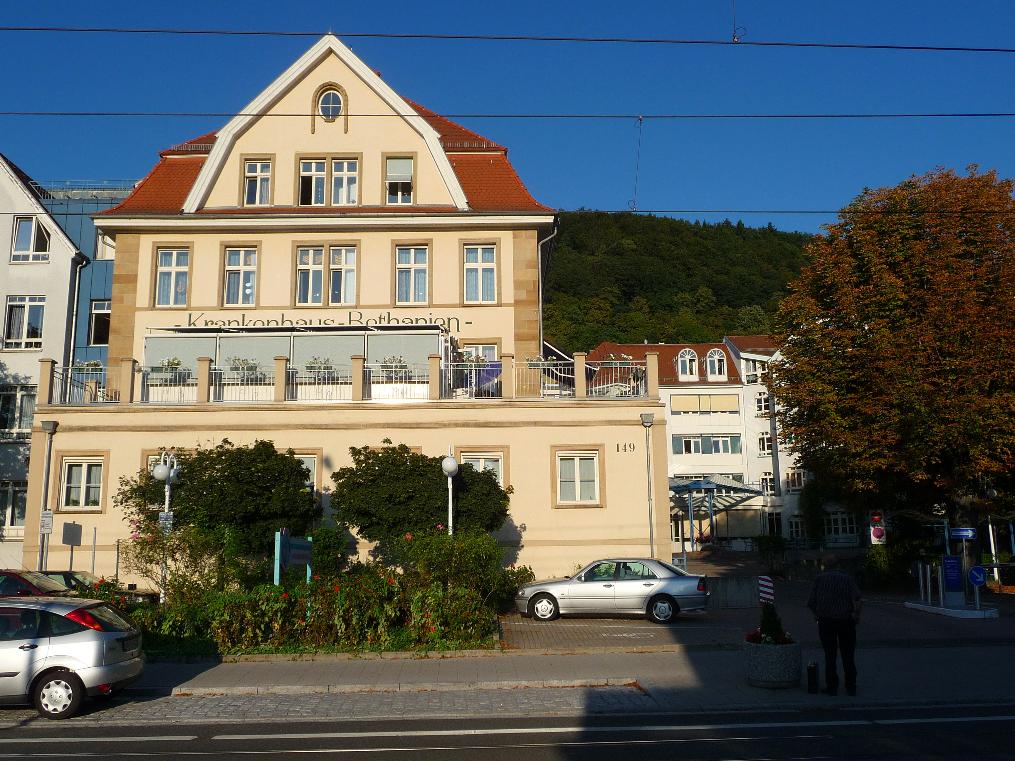 Krankenhaus Bethanien in Heidelberg (Baden-Württemberg, Deutschland)